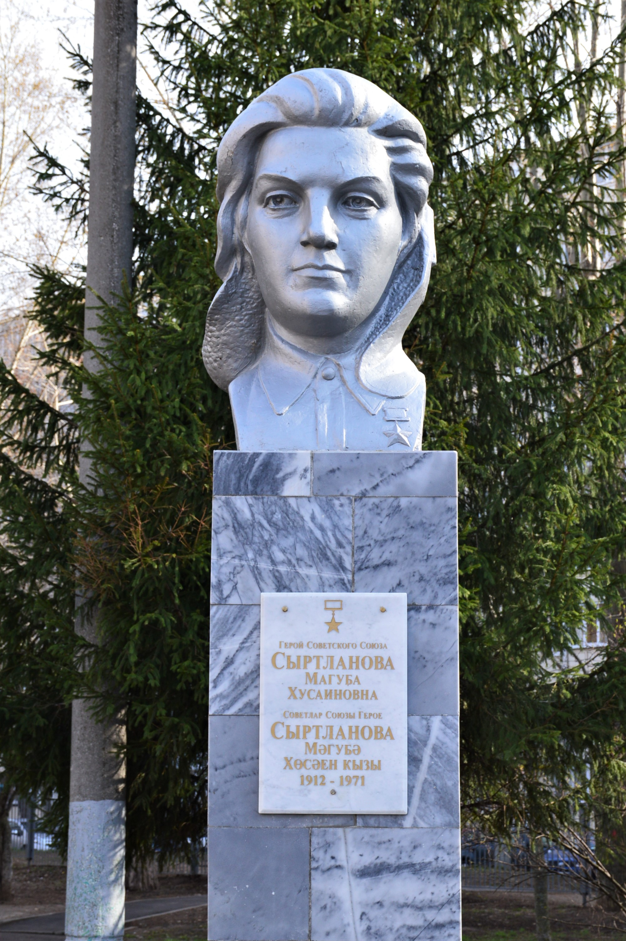 Казань, Горки. Памятник-бюст Героя Советского Союза лётчицы Магубы Сыртлановой на территории гимназии № 52